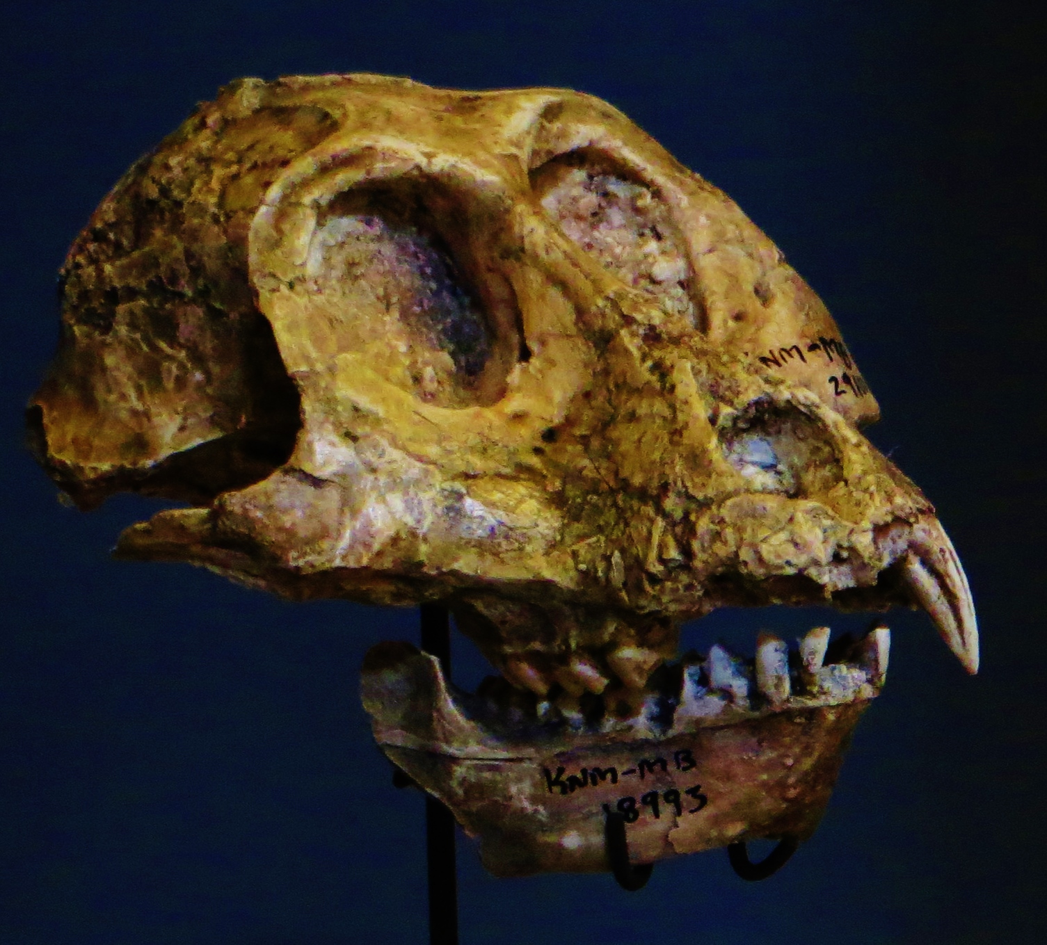 Fossil of Victoriapithecus, an extinct mammal - Took the photo at Musee d'Histoire Naturelle, Paris